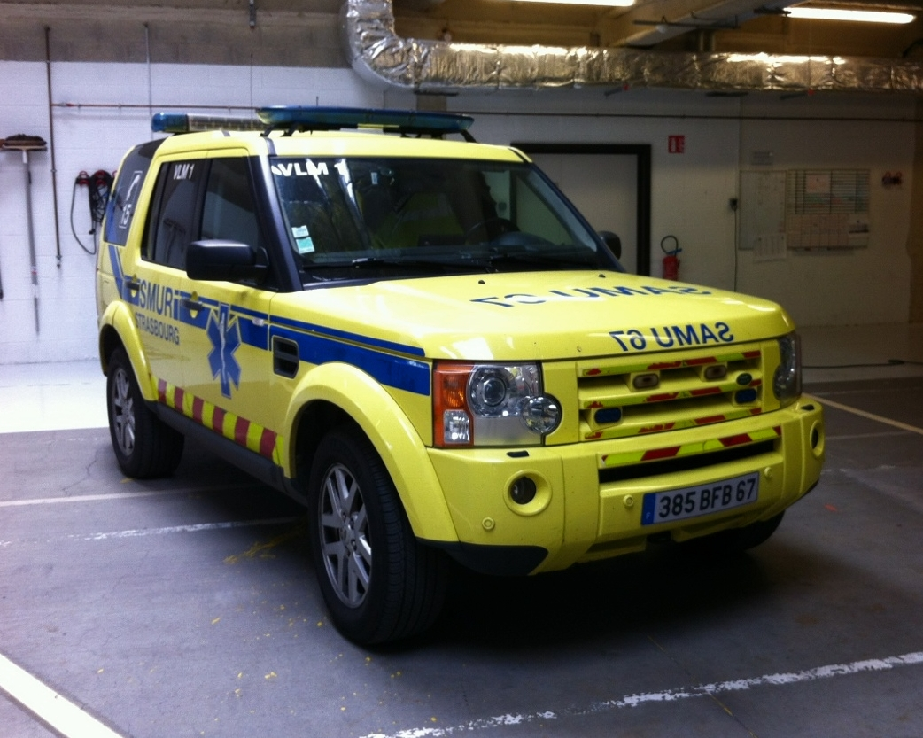 Land Rover Discovery du SAMU 67, VLM 1 à Strasbourg